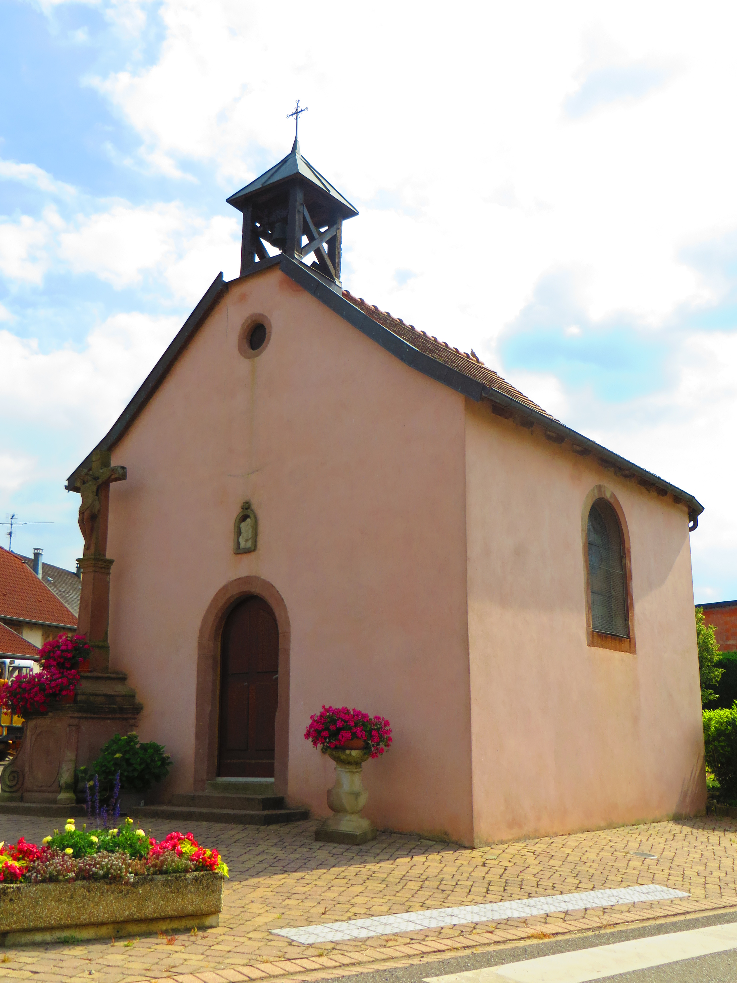 Baerendorf Chapelle de la Sainte-Famille